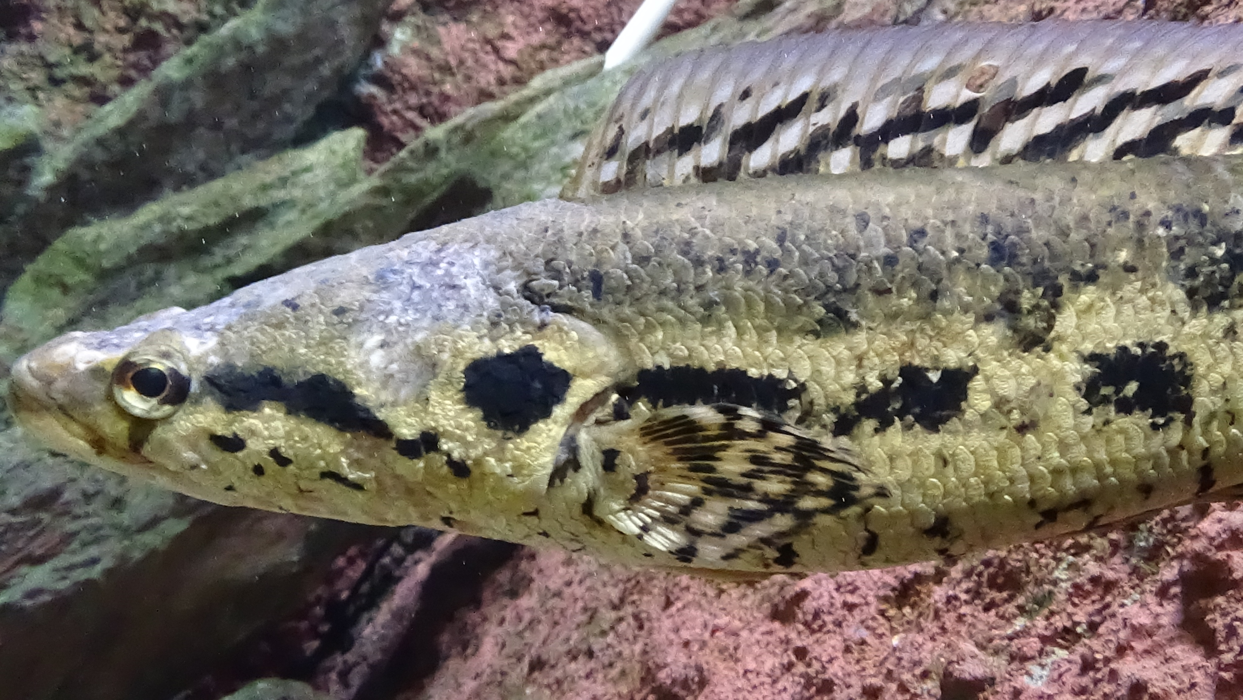 Parachanna obscura - Aquarium Tropicale du palais de la Porte Dorée, Paris, Ile de France, France - 12/2014